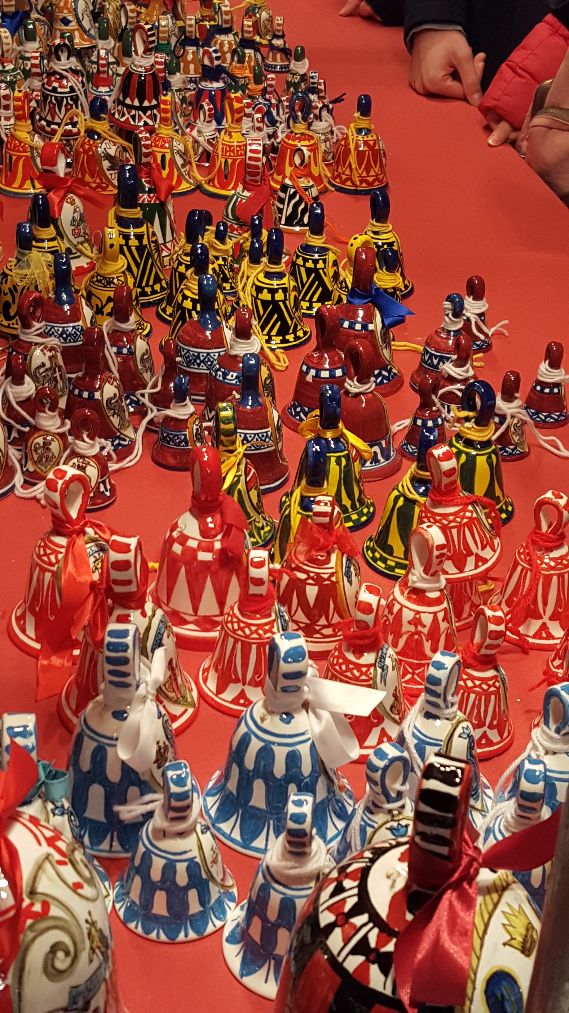 Uno dei banchi di vendita delle "Campanine" in ceramica, dipinte coi colori delle Contrade, durante la Fiera di Santa Lucia, a Siena.